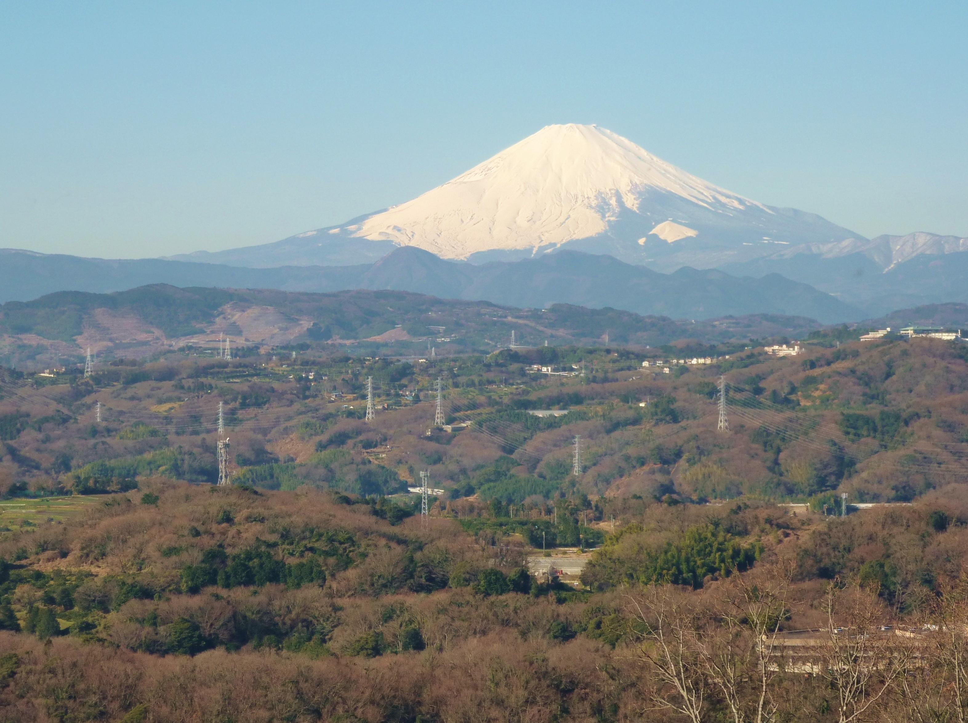 湘南平より望む富士山と大磯丘陵（神奈川県平塚市・大磯町）